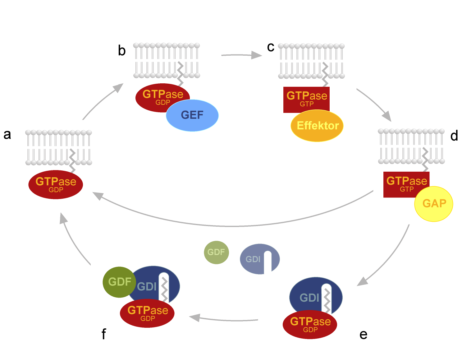 GTPase-Zyklus, selbst erstellt, GNU-FDL